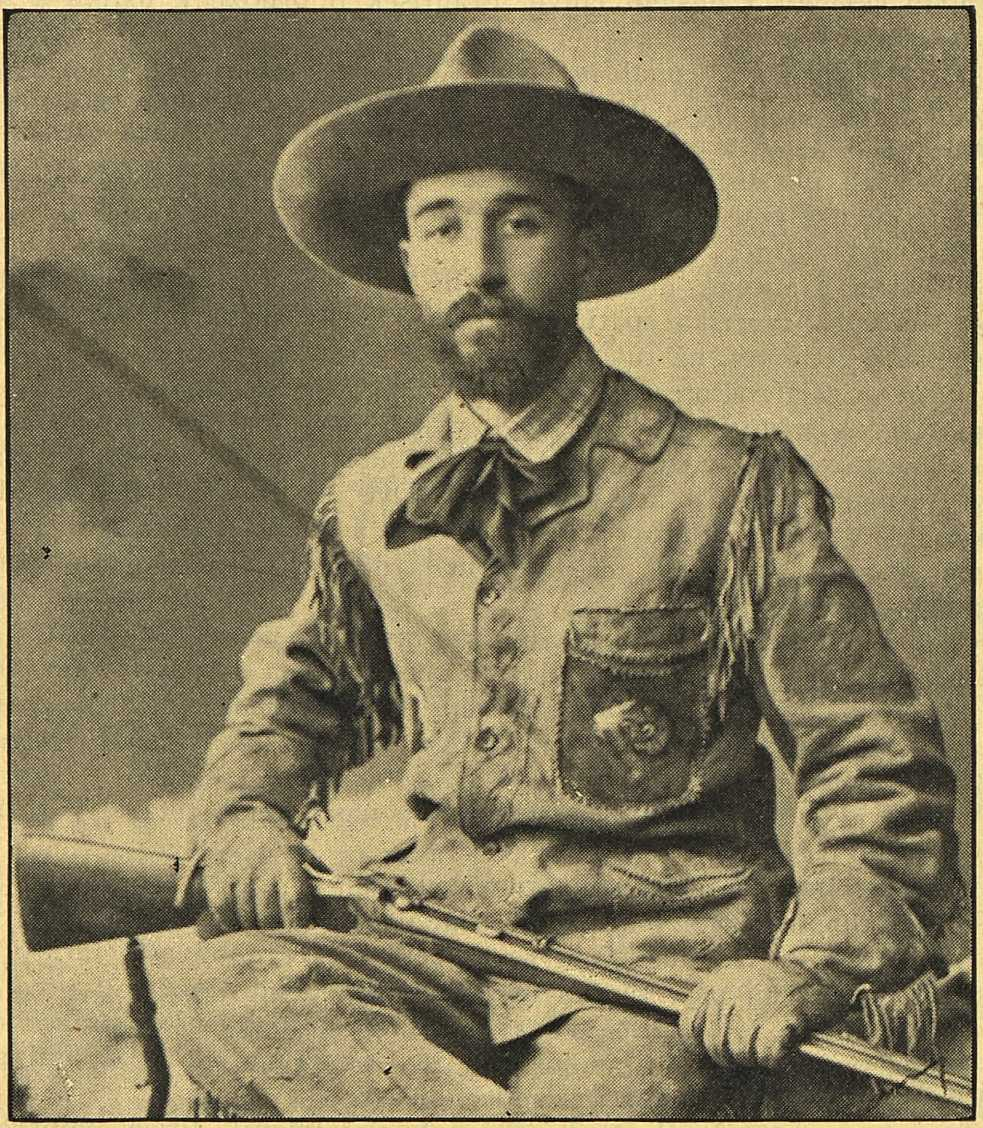 Filip šlechtic Oberländer (1875–1911). Fotografie z cesty severní Amerikou v roce 1905